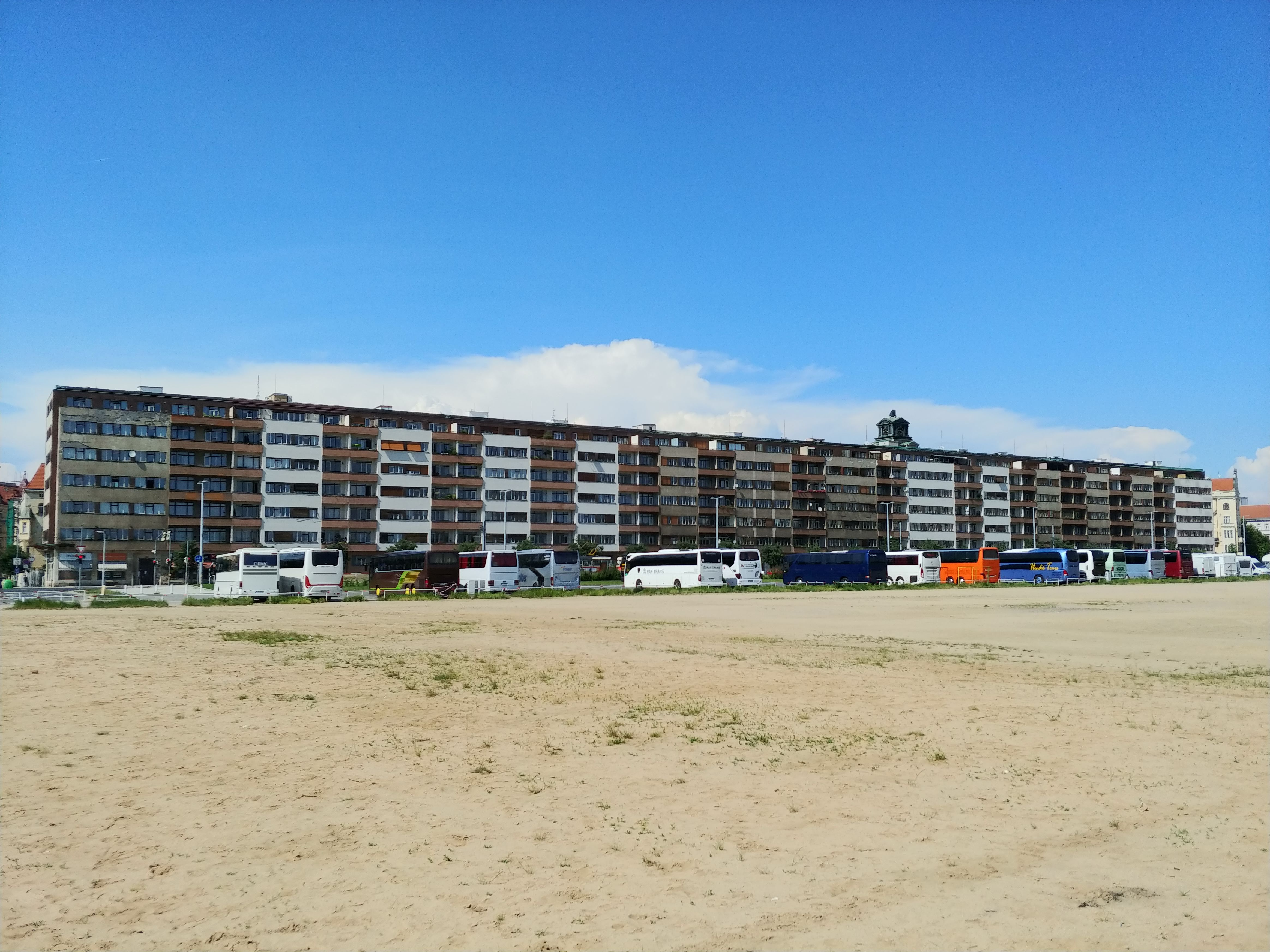 Pohled na celá blok domů Molochov z Letenské pláně